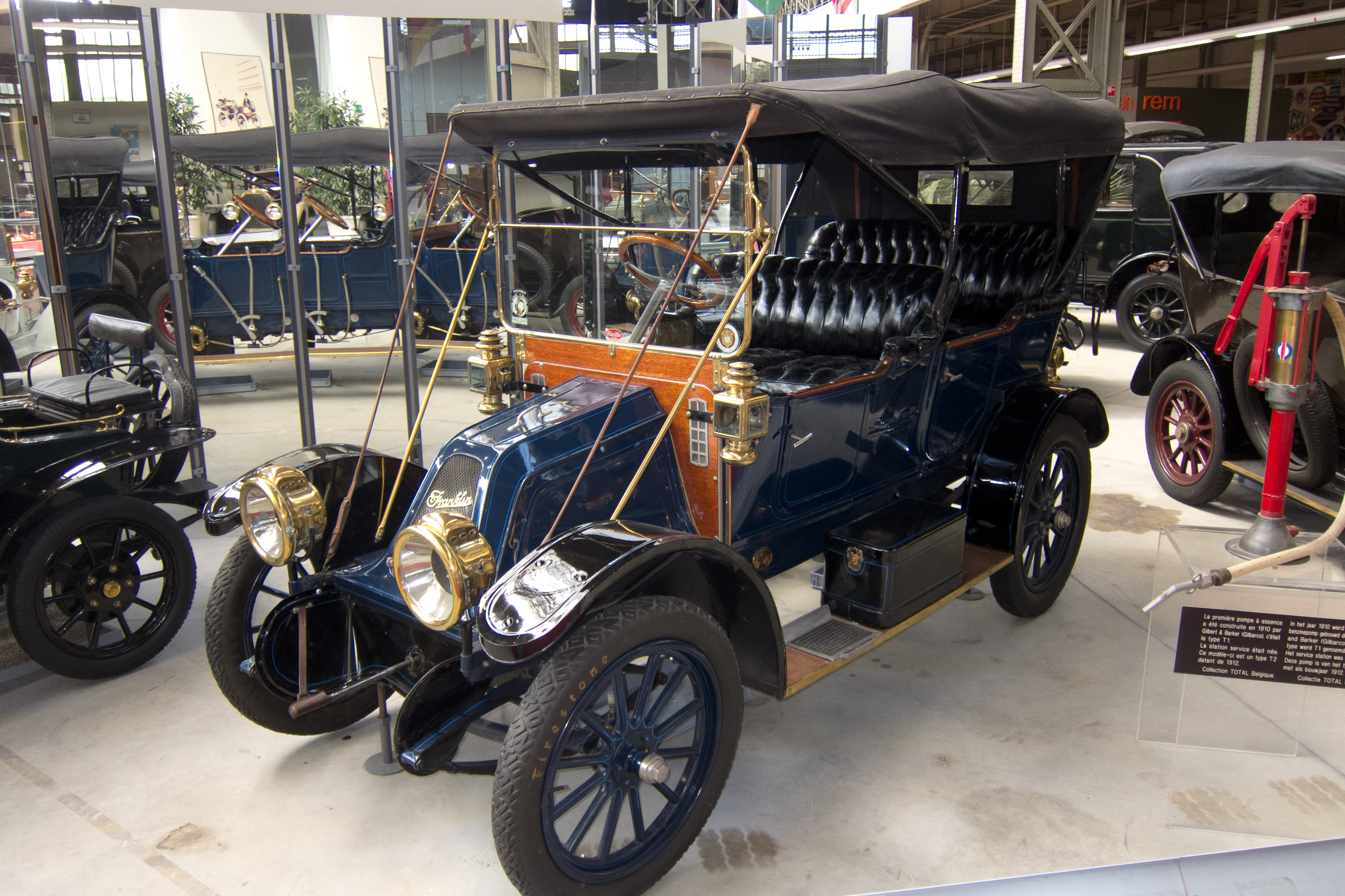 Franklin (1911) at Autoworld Brussels, Belgium, 2011